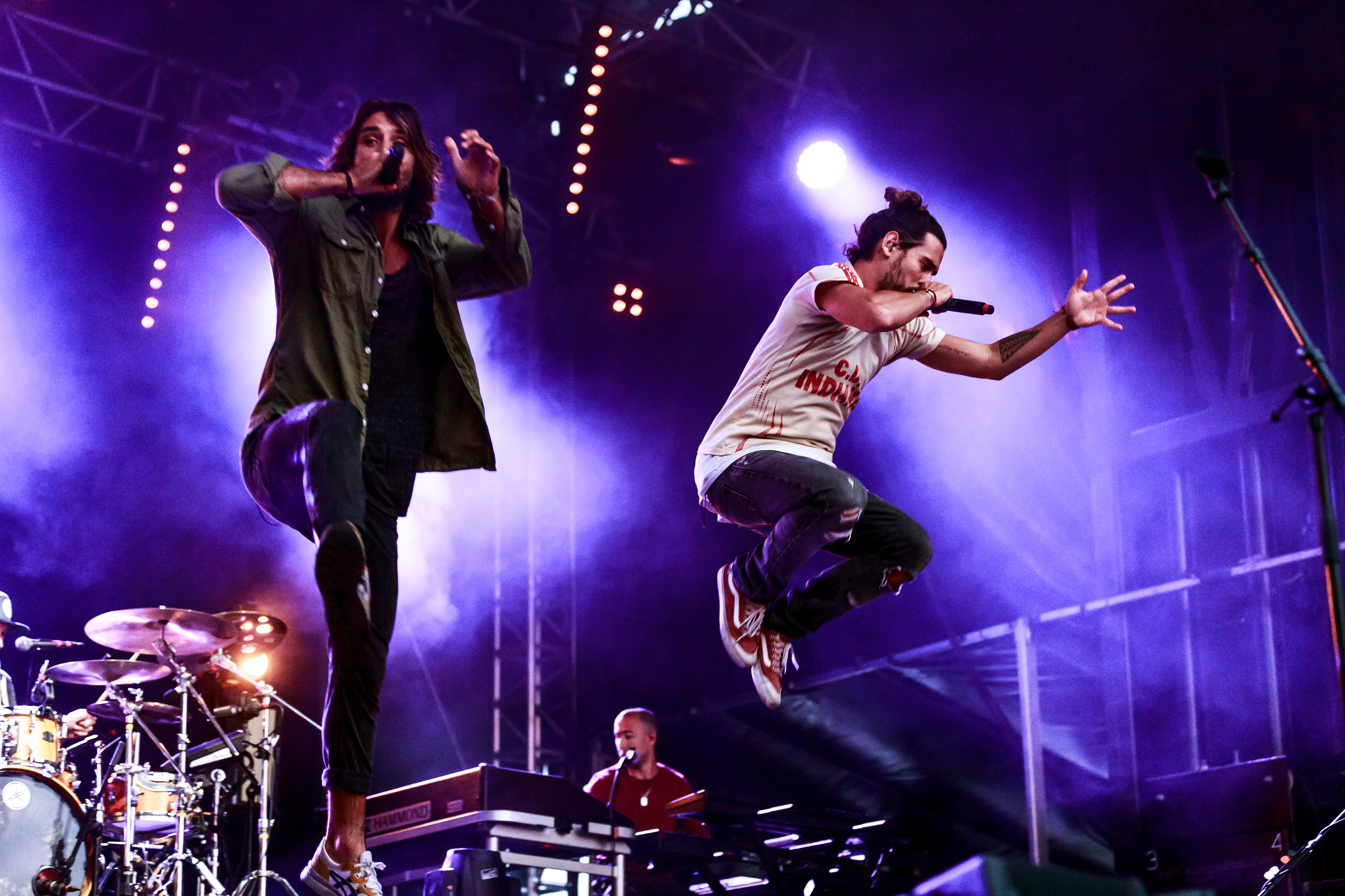 Fréro Delavega en concert au festival de Buguélès à Penvénan (22) le 30 juillet 2016.